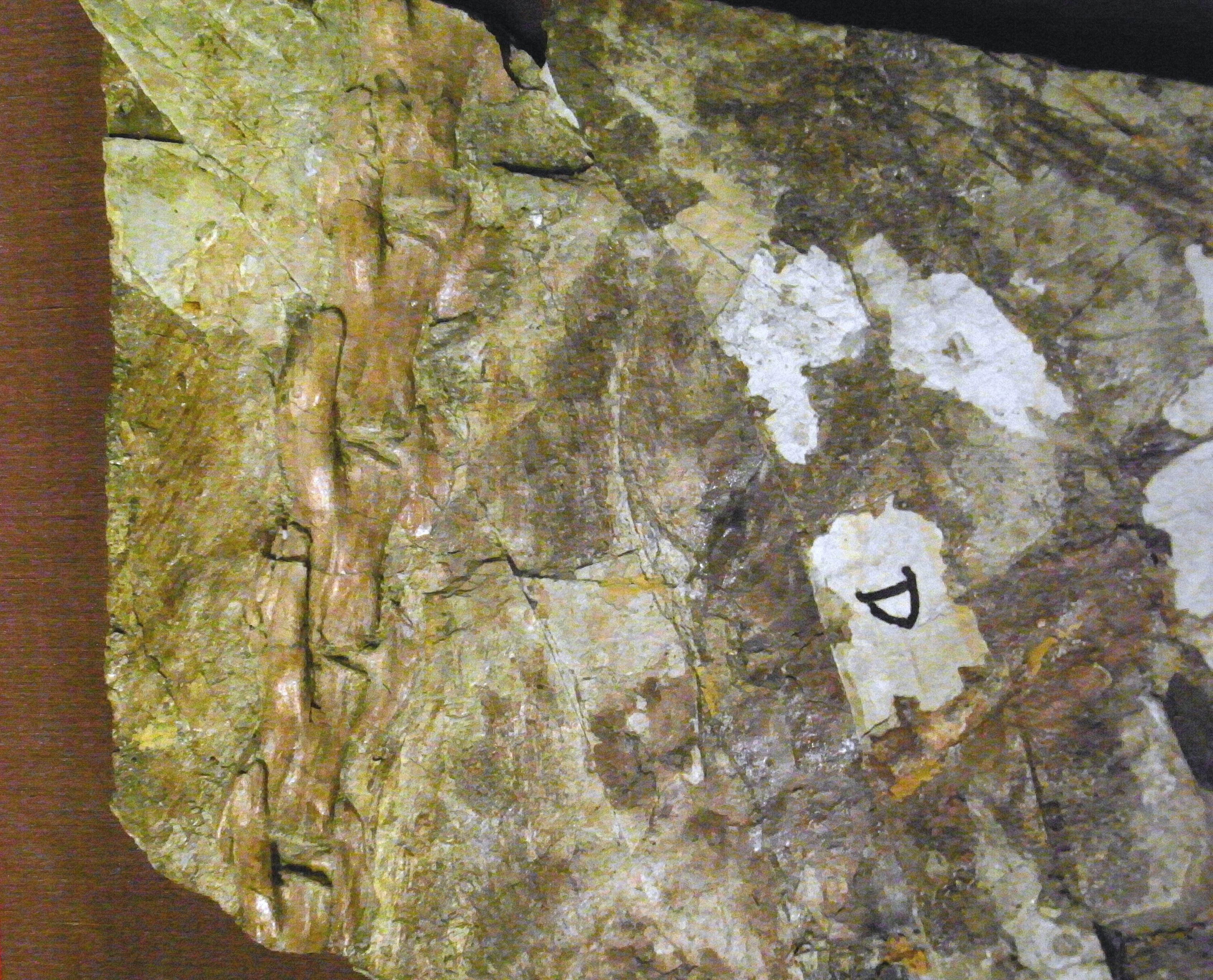 こっちはよくわかります。